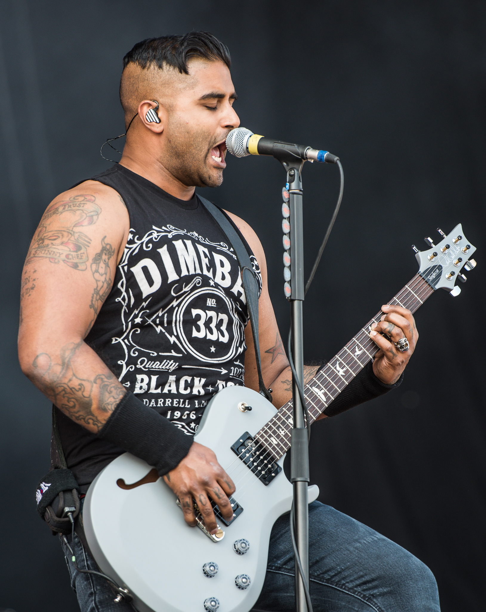 ARGO-Konzerte,Dave Baksh,Konzert,Livekonzert,Livemusik,Musik,RiP,Rock im Park 2017,Sum 41,Zeppelin Stage